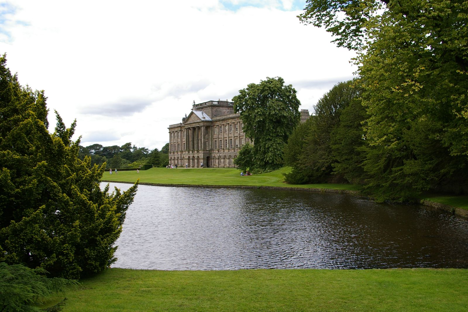 Lyme Park, Greater Manchester.